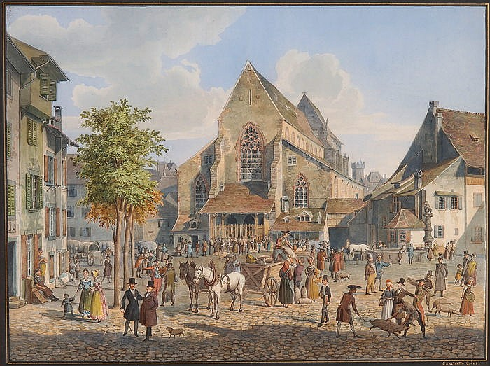 Barfüsserplatz in Basel mit Barfüsserkirche und reicher Figurenstaffage